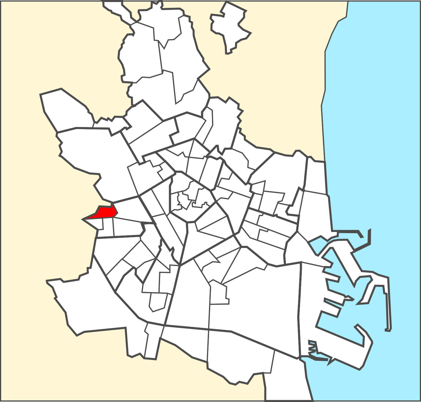 Localització del barri dins de la ciutat de València.